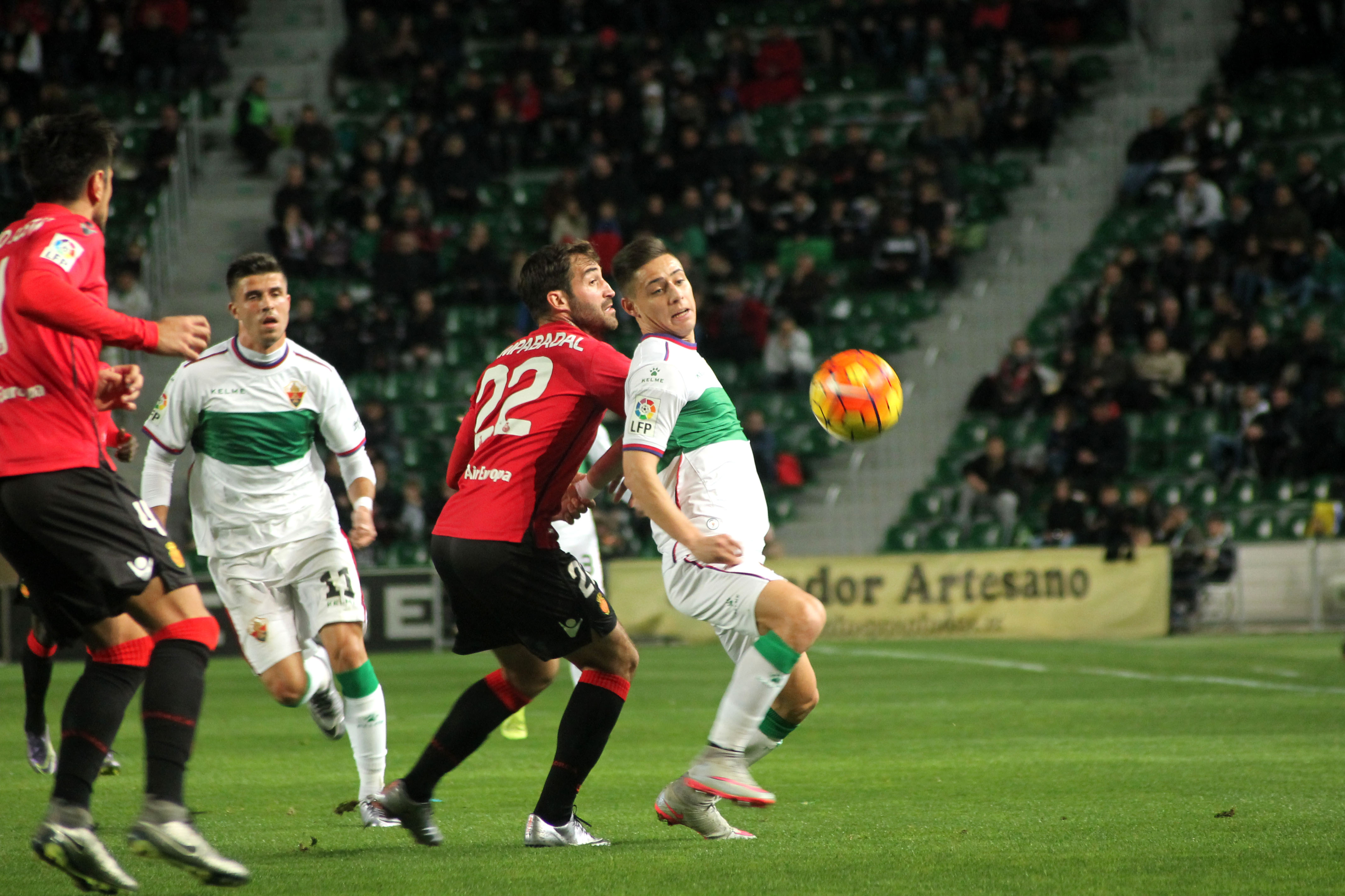 Elche vs Mallorca